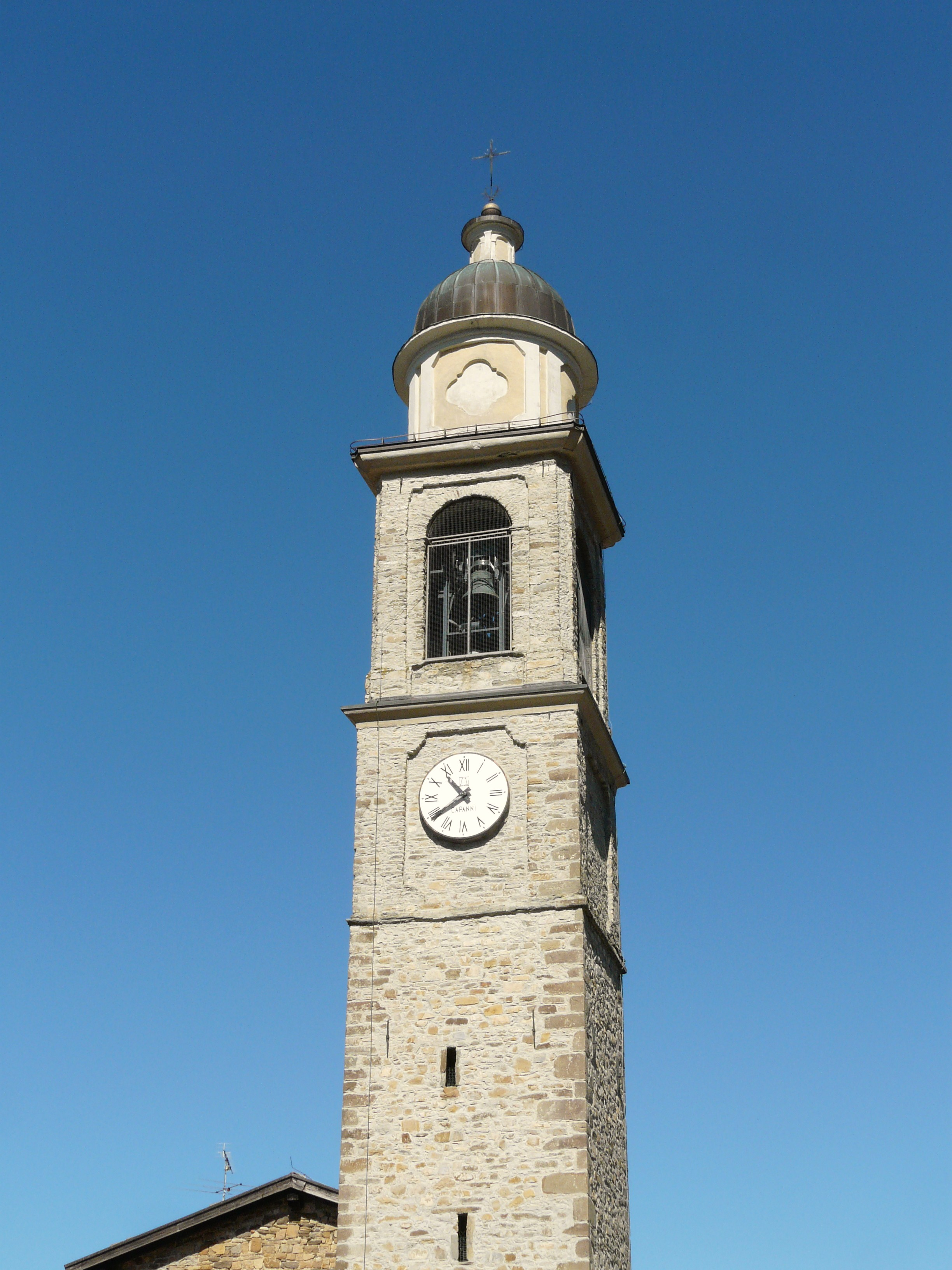 Campanile della pieve di Santa Maria Assunta di Fabbrica Curone, Piemonte, Italia